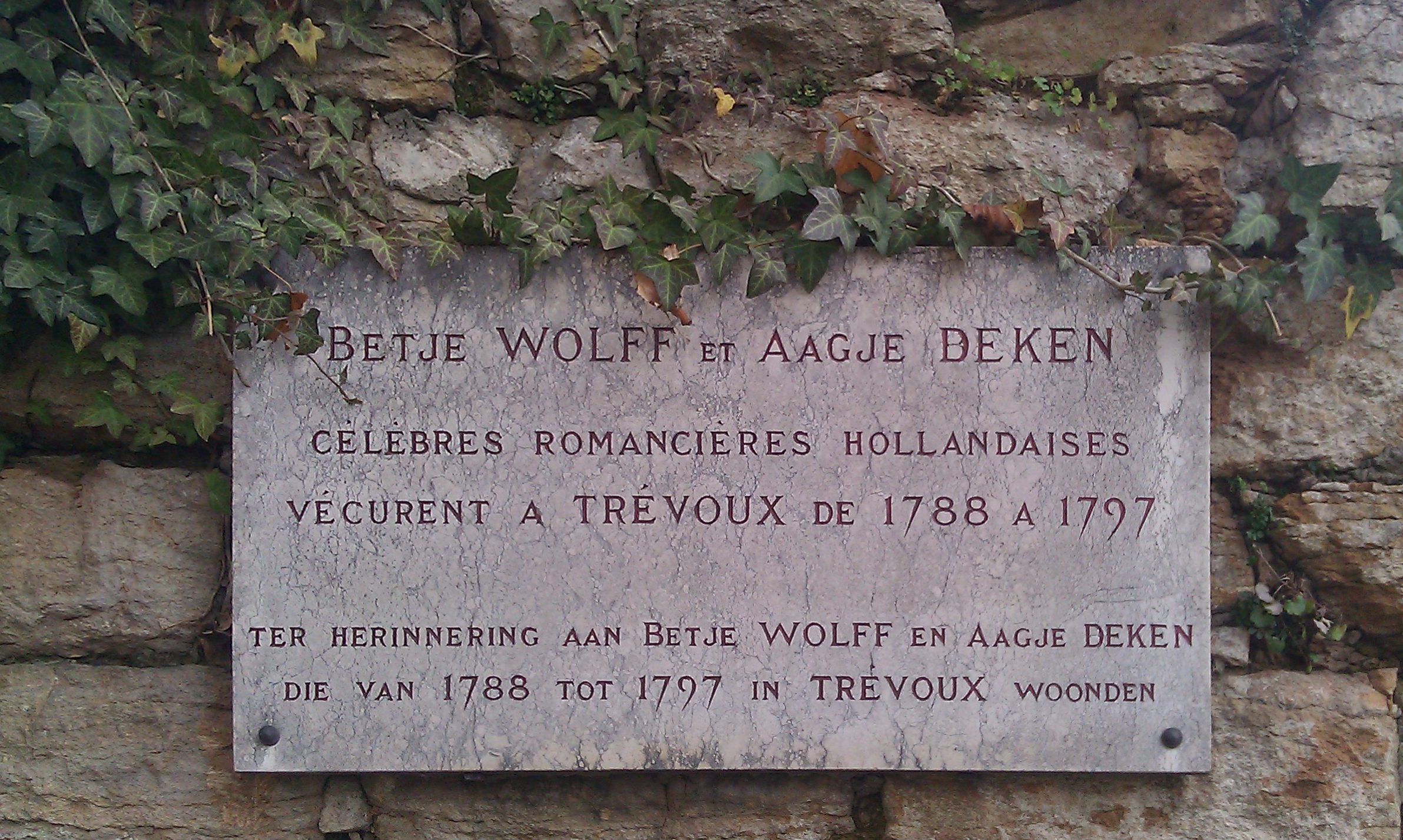 Plaque à Trévoux (Ain, France) en mémoire des romancières Betje Wolff et Aagje Deken.